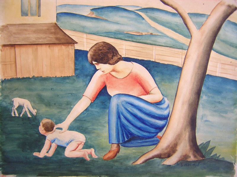 Mutter mit Kind und Lamm vor Dorflandschaft